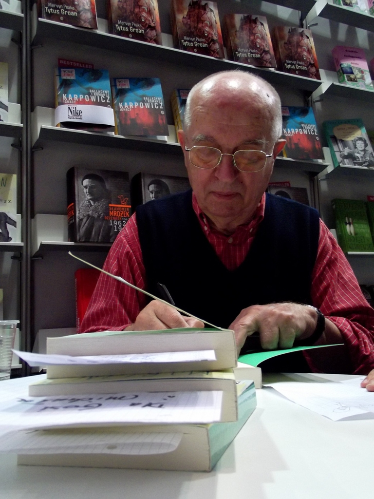 Marian Pilot, polski pisarz.